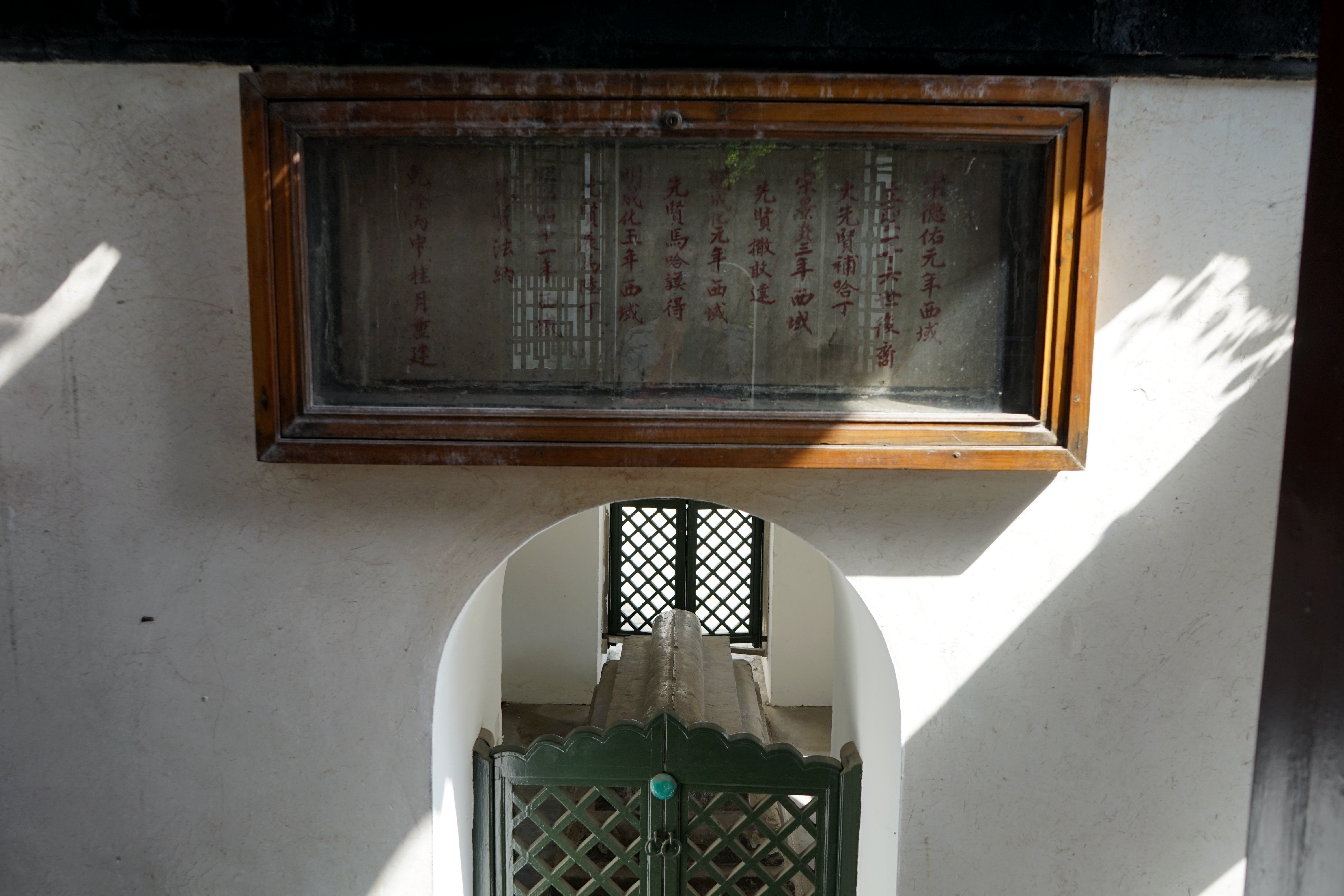 中文（中国大陆）: 重修普哈丁墓石碑